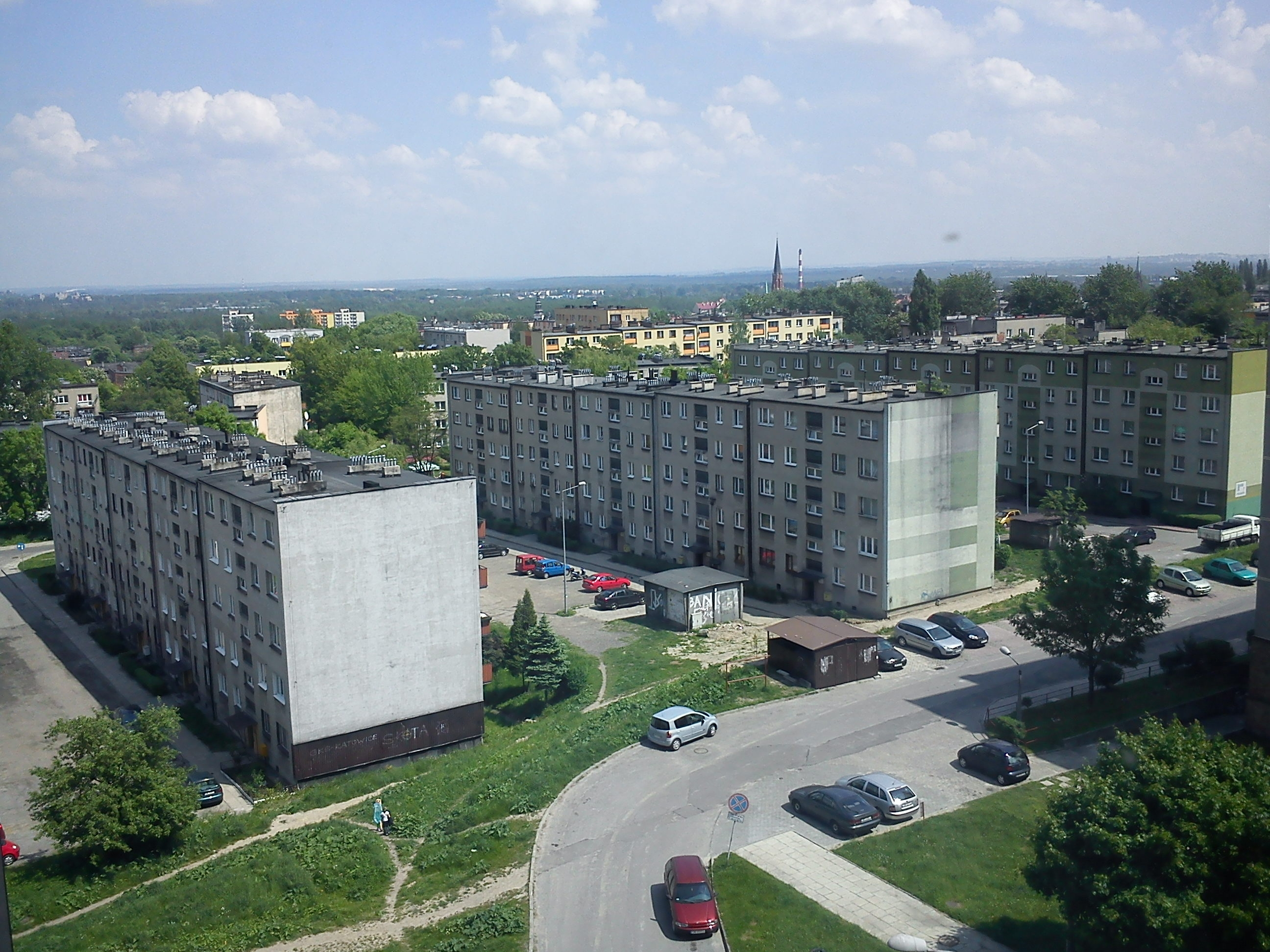 Panorama Mysłowic